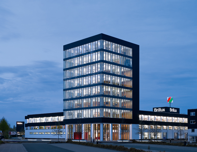 Büroturm der Brillux-Zentrale in Münster (Westfalen). Hier befindet sich die Hauptverwaltung des Herstellers von Farben und Lacken Brillux.